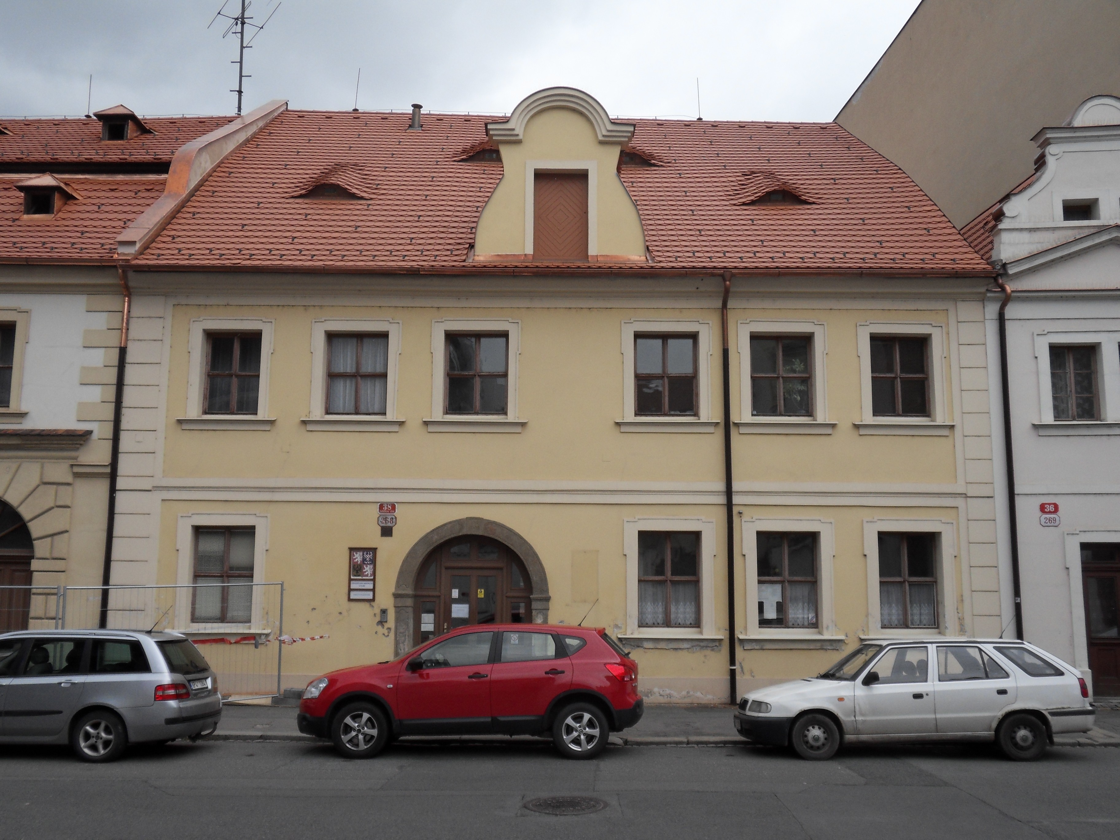 Sedláčkova 38, Sedláčkova 268/38, Plzeň.